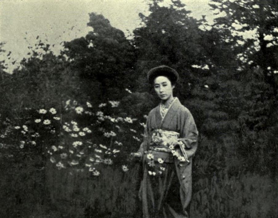 寺島宗則の妻。士族曽昌啓の娘。1842-1927